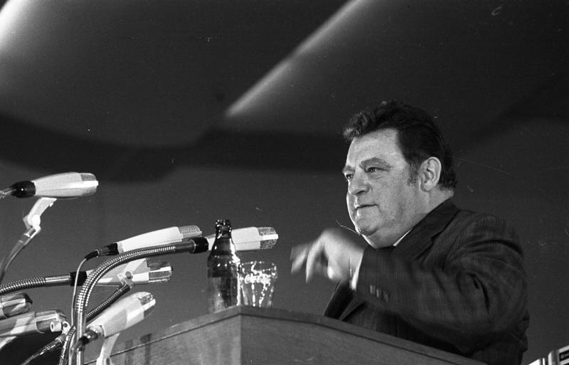 Großkundgebung der CDU zur Bundestagswahl in Köln, Messehalle